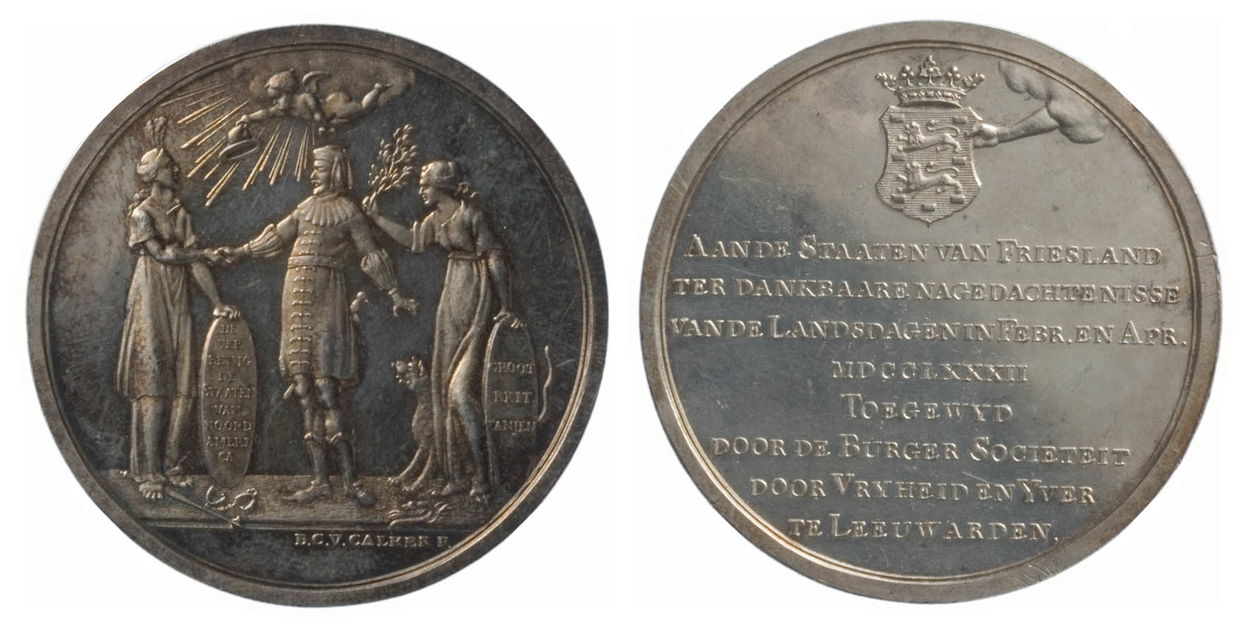 Barend Christiaan van Calker, Acceptatie van John Adams, afgezant van de Verenigde Staten, en het afwijzen van een afzonderlijke vrede met Engeland, door Friesland, penning, zilver; 1782. Collectie Teylers Museum, TMNK 02276.